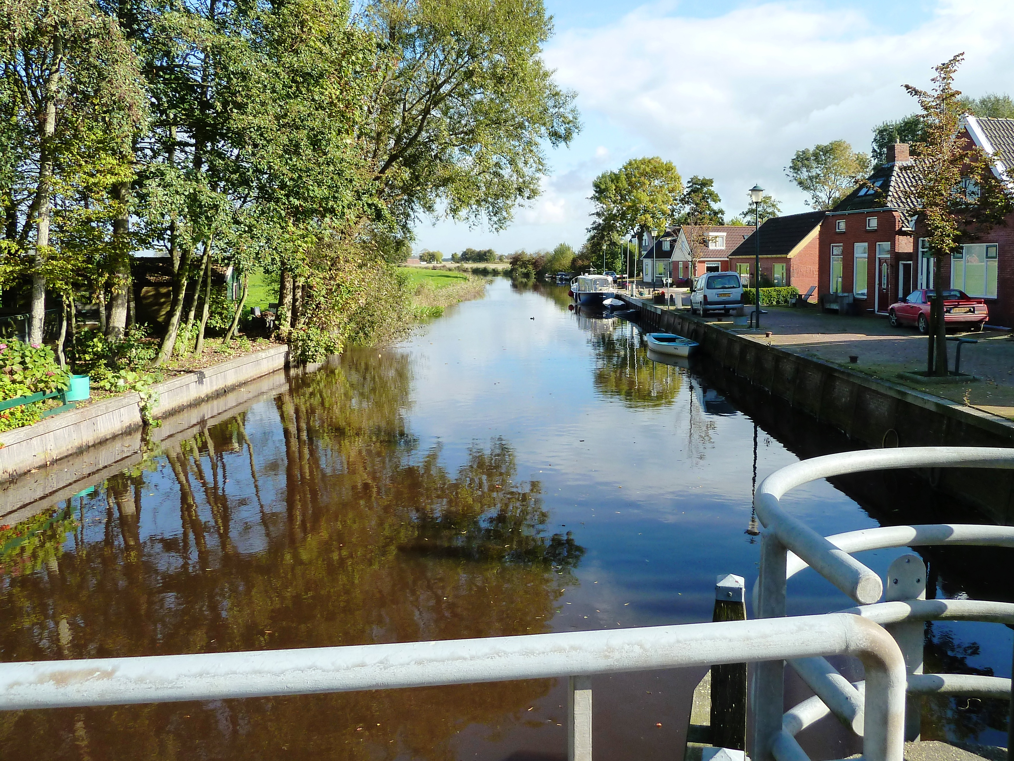 Diepswal gezien vanaf de brug in Pieterzijl.